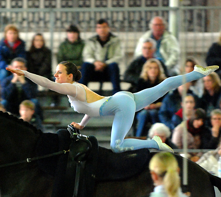 Simone Wiegele Vaulting Flag Voltigieren Fahne